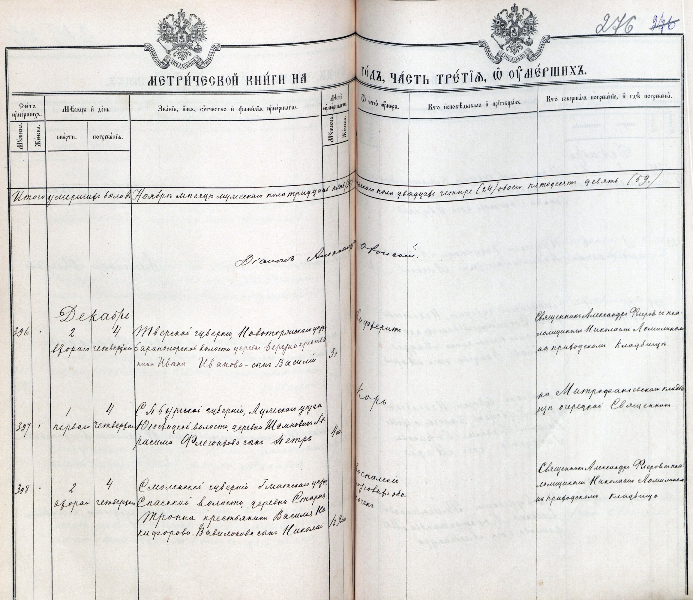 Разворот раздела "О умерших" метрической книги церкви Петра Митрополита в Санкт-Петербурге, 1901 год.